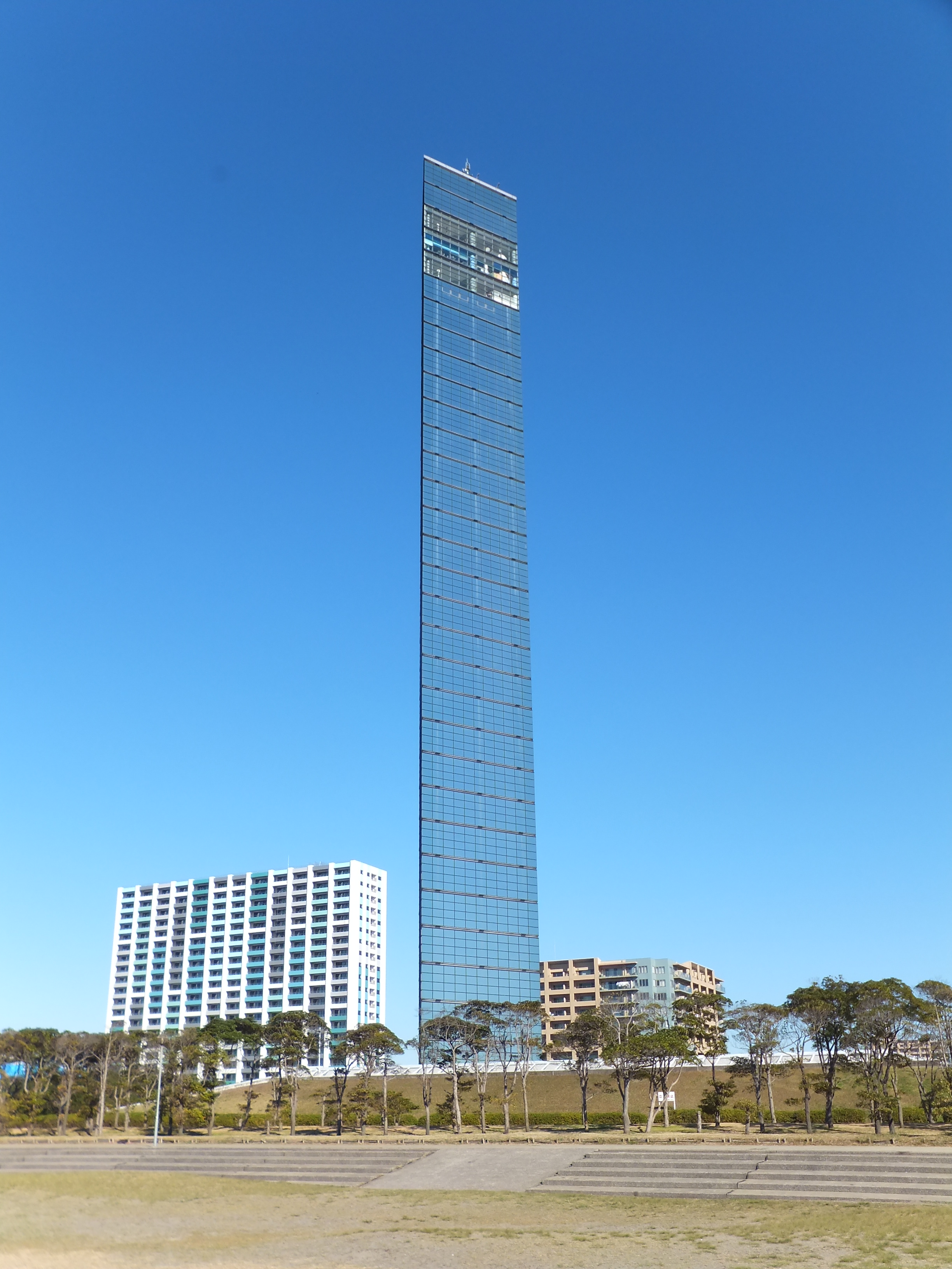 千葉ポートタワー、千葉市中央区